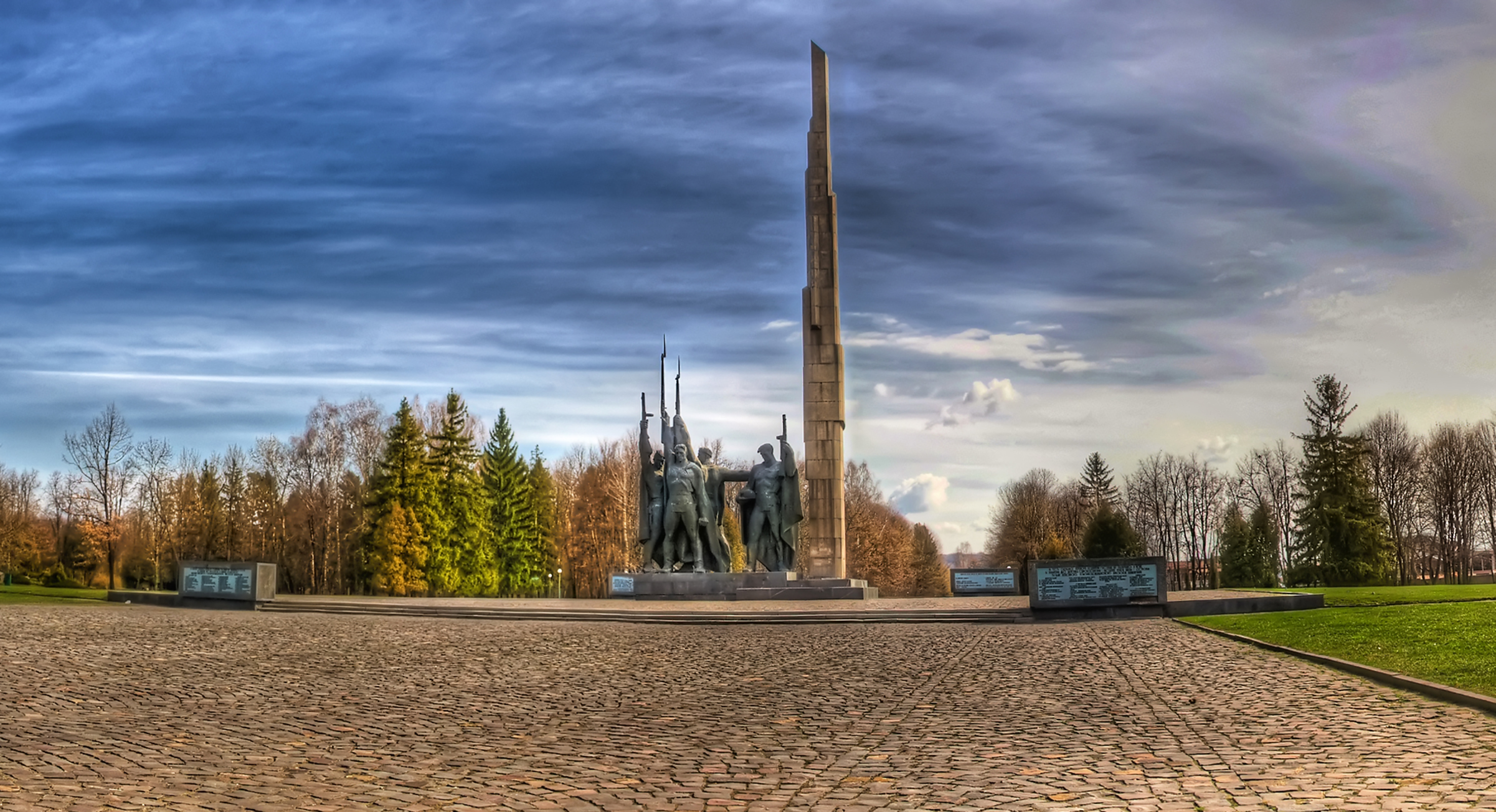 Дендропарк «Поділля», м. Хмельницький, на перетині проспекту Миру та Старокостянтинівського шосе